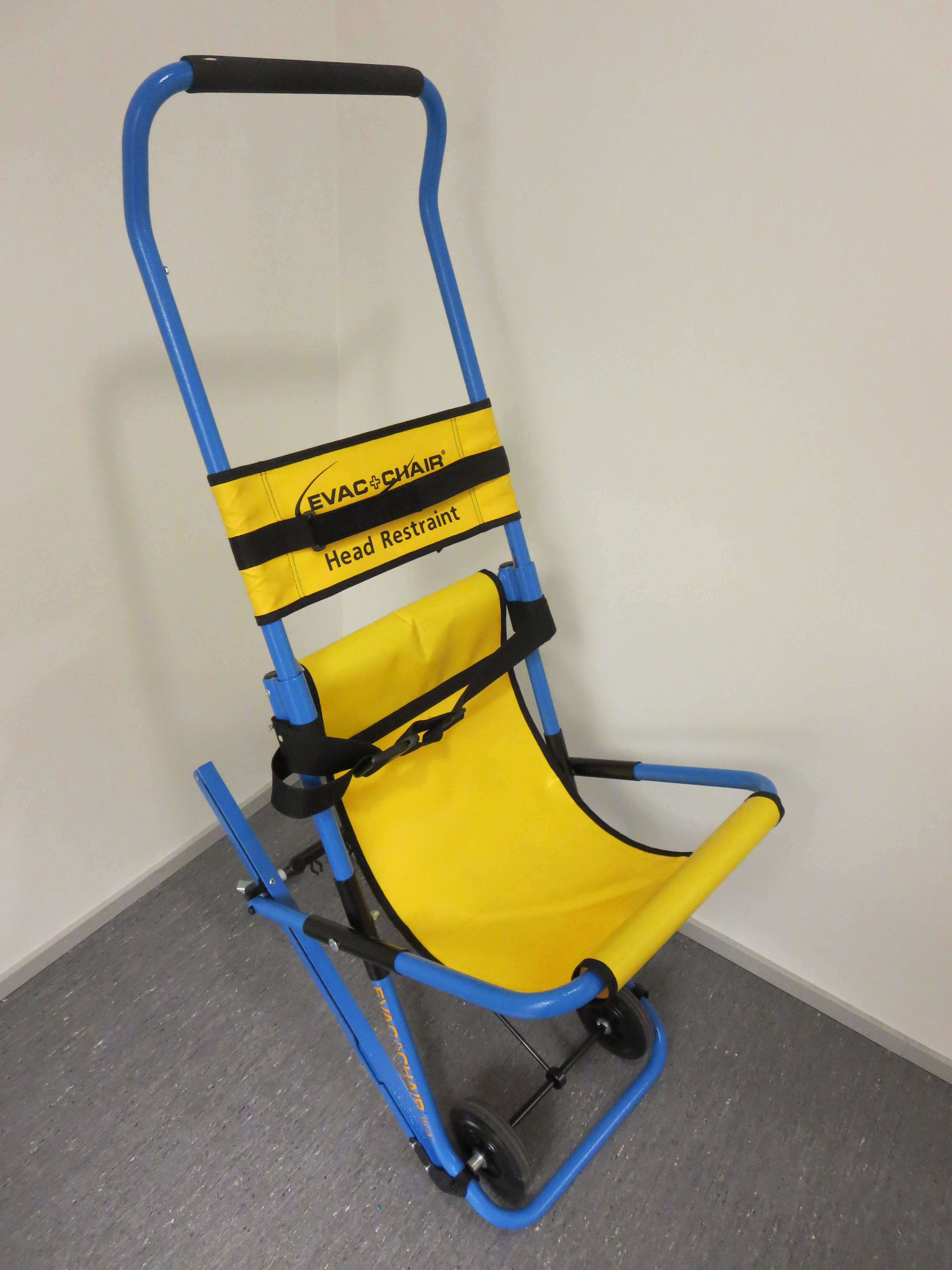 Evac+Chair evakuointituoli